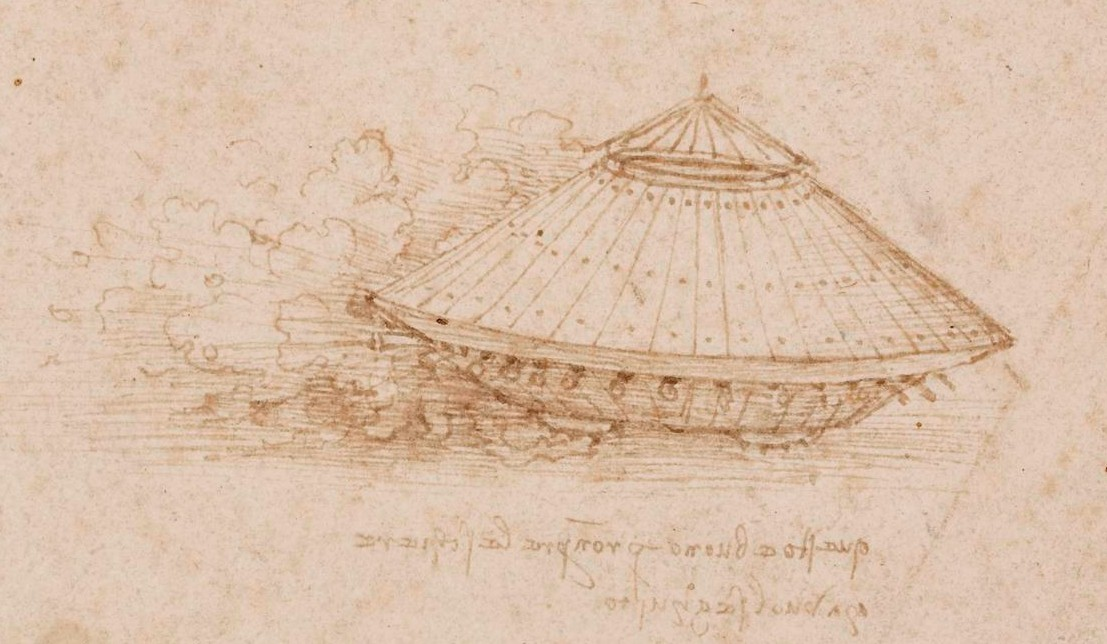 Leonardo da Vinci, design for a fighting vehicle.